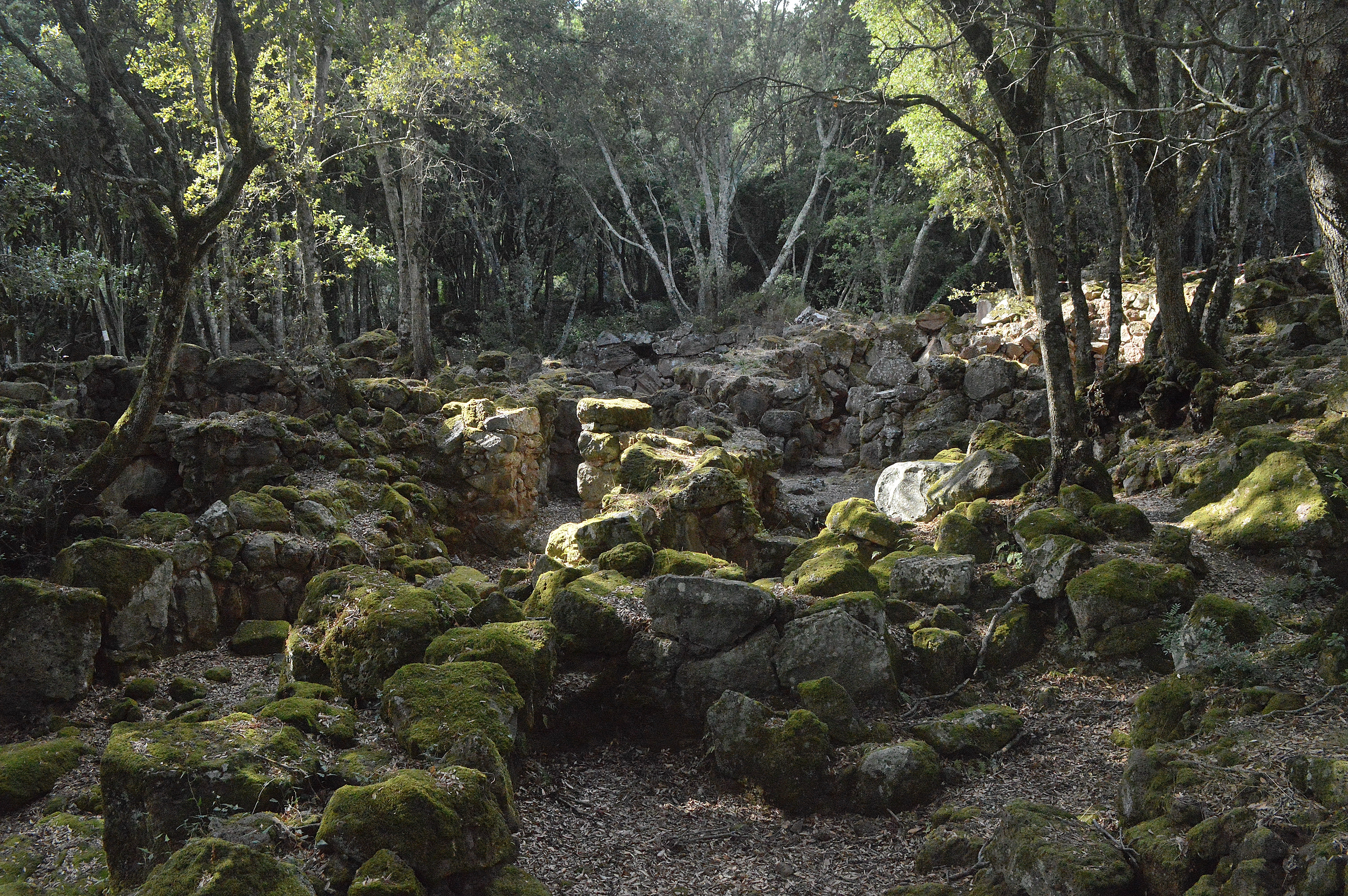 Villaggio nuragico di Brunku 'e S'Omu This is a photo of a monument which is part of cultural heritage of Italy.